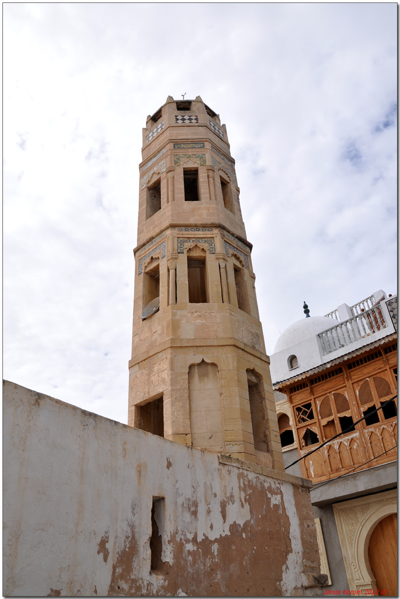 Vue du minaret octogonal (de style turc) de la médersa El Zaqqaq, à Sousse, en Tunisie.